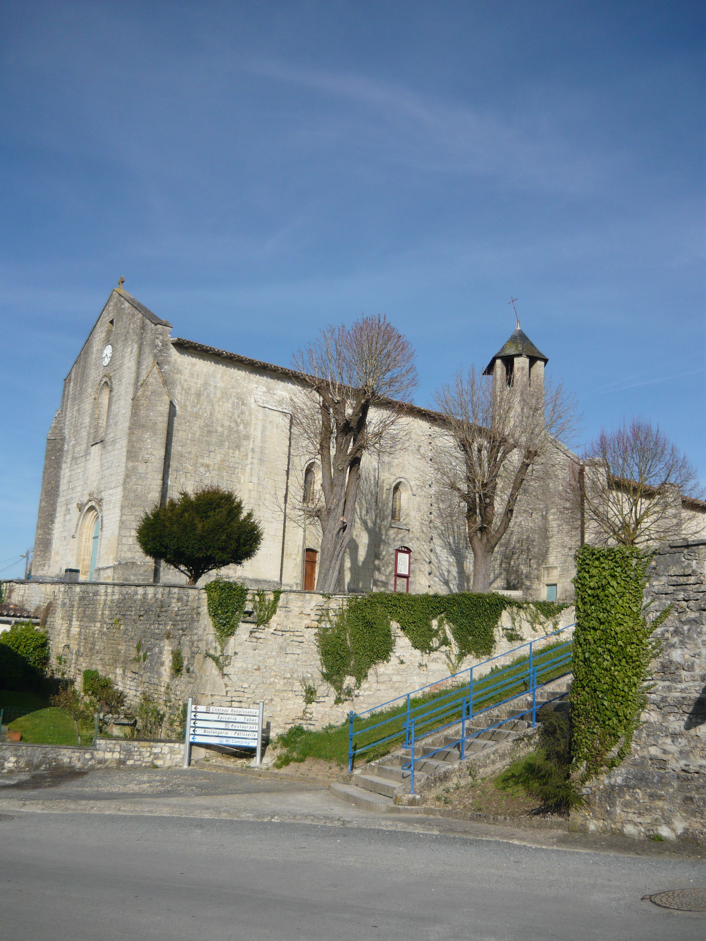 La façade ouest de l'église Saint-Pierre de Dampierre-sur-Boutonne